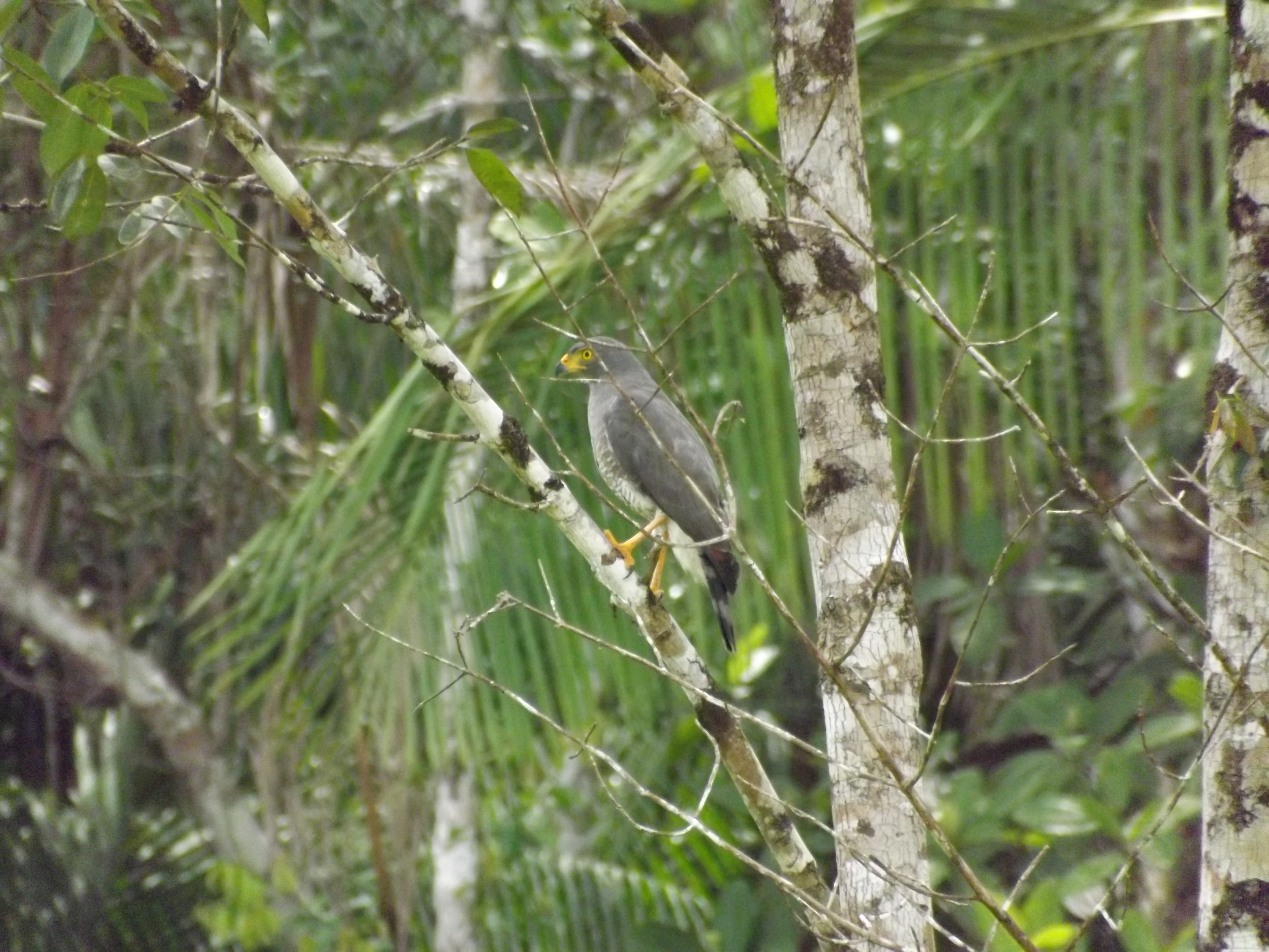 Buse à gros bec